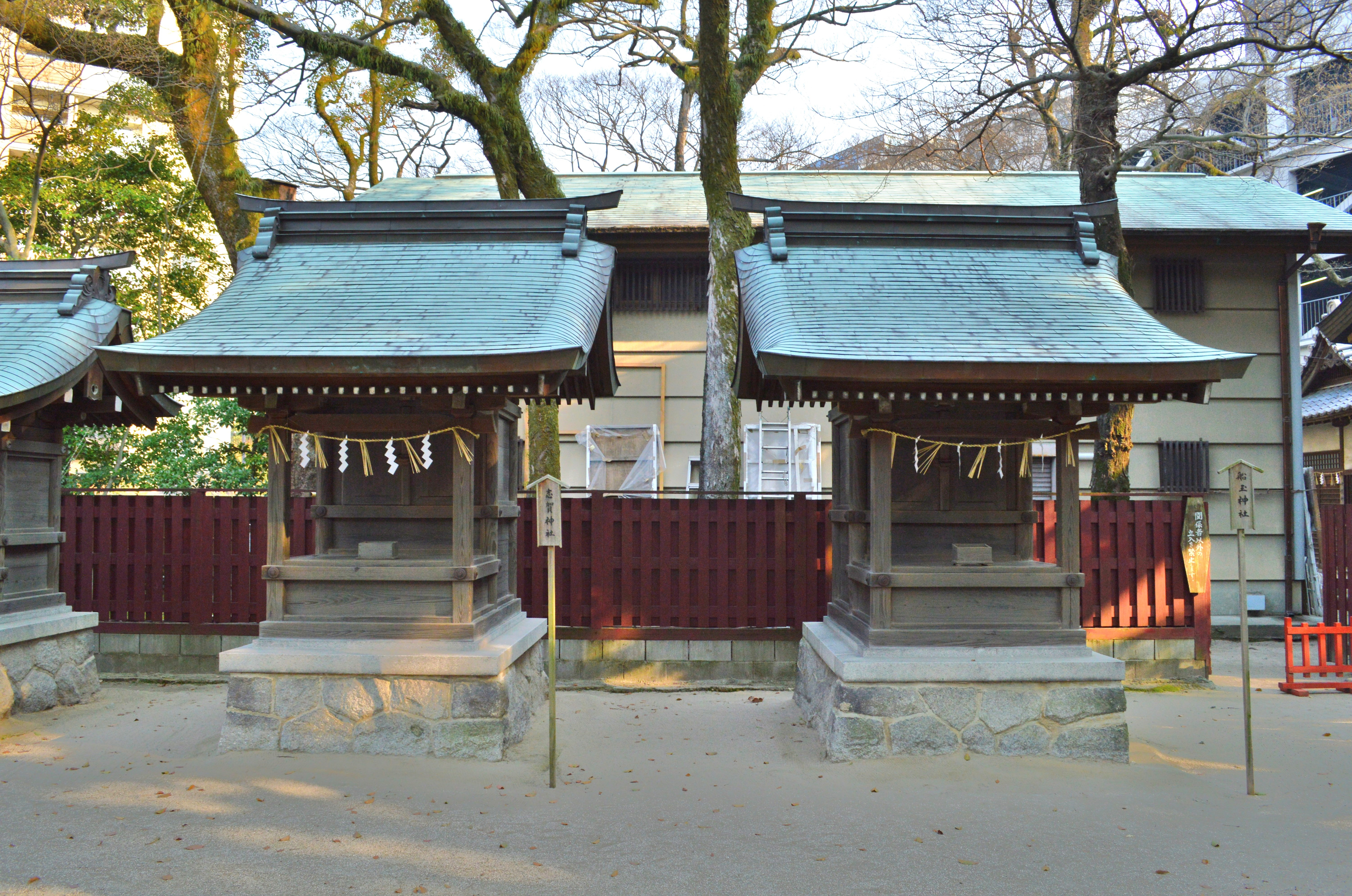 住吉神社 (福岡市) 境内志賀神社・船玉神社